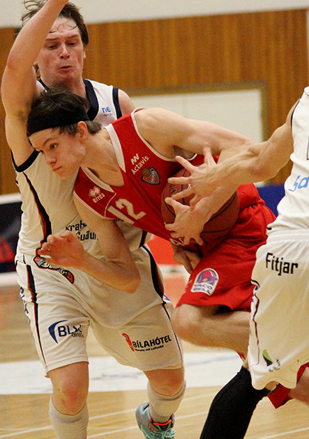 Kári Jónsson (12) of Haukar drives past Valur Orri Valsson of Keflavík in á Úrvalsdeild karla game on December 19, 2014.